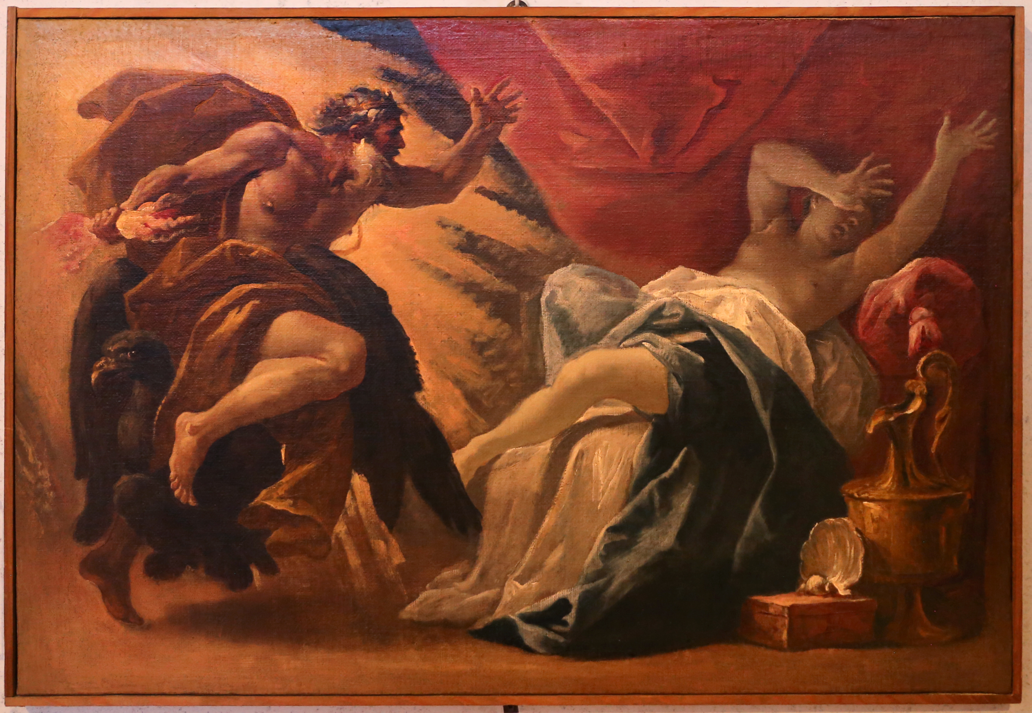 Museo di Castelvecchio This is a photo of a monument which is part of cultural heritage of Italy.